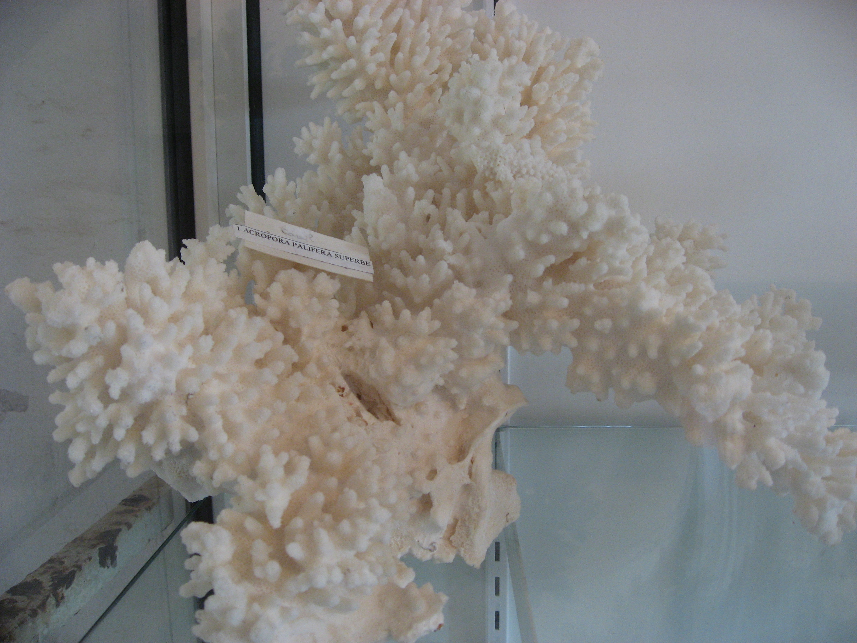 Acropora palifera au Fort Napoléon en Guadeloupe, îlet Terre de haut-de-haut l'archipel Saintes